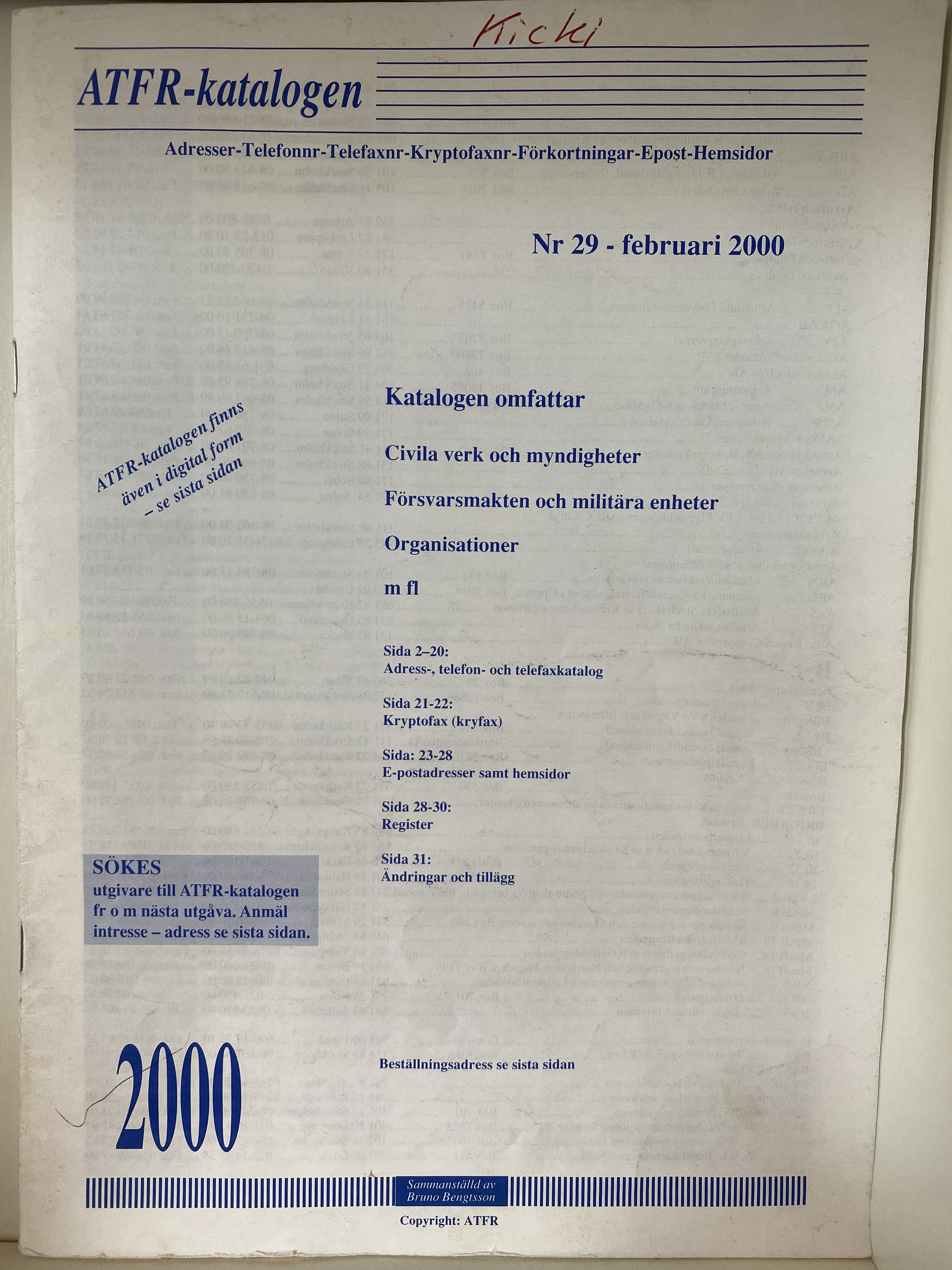 ATFR-katalogen årgång 2000, utgåva 29, sida 1 (förstasidan)